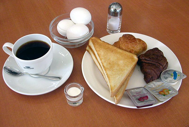 撮影者：小太刀 レギュラー珈琲館のモーニングフリーです。朝11時まで飲み物を頼むとパンとゆで卵が食べ放題になります。写真は神田店でコーヒーは珈琲館ブレンド380円です。トーストは用意されているオーブンを用いて客が自分で焼きます。